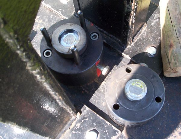 Schaupragen 2004 2